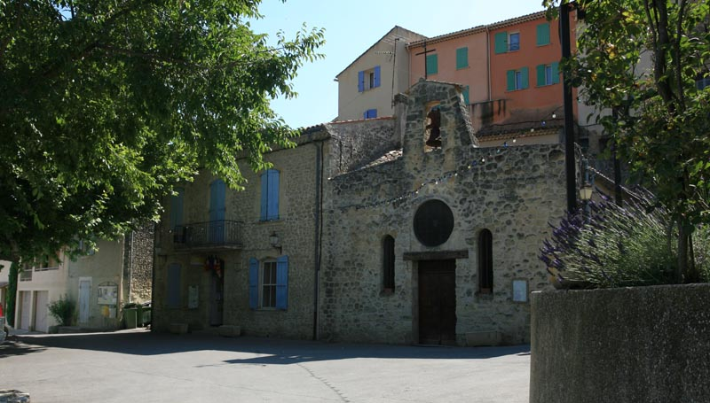 the village of Cabrières d'Aigues, Vaucluse, France